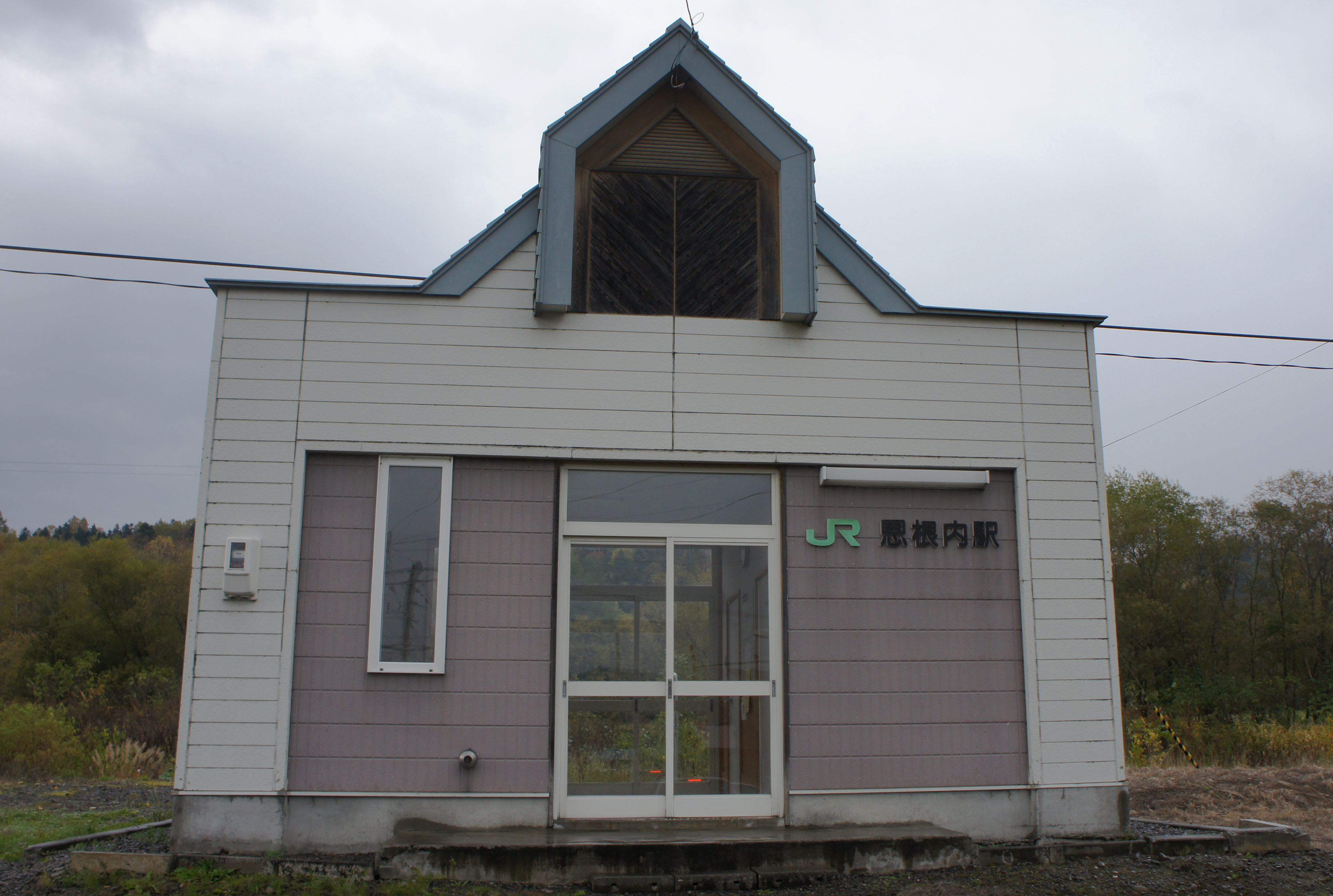 JR宗谷本線・恩根内駅の駅舎 Sony NEX-3